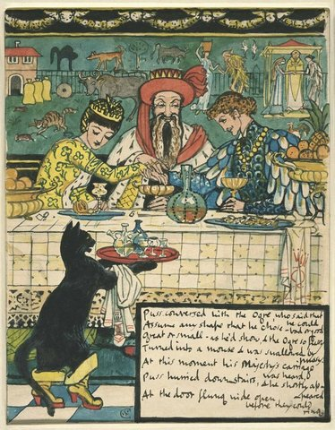 Гравюры по рисункам Крейна к сказке "Кот в Сапогах"